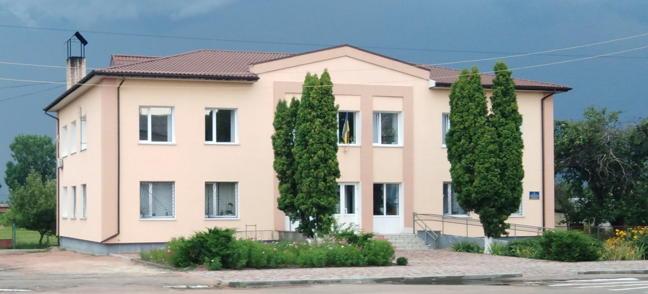 Hflf